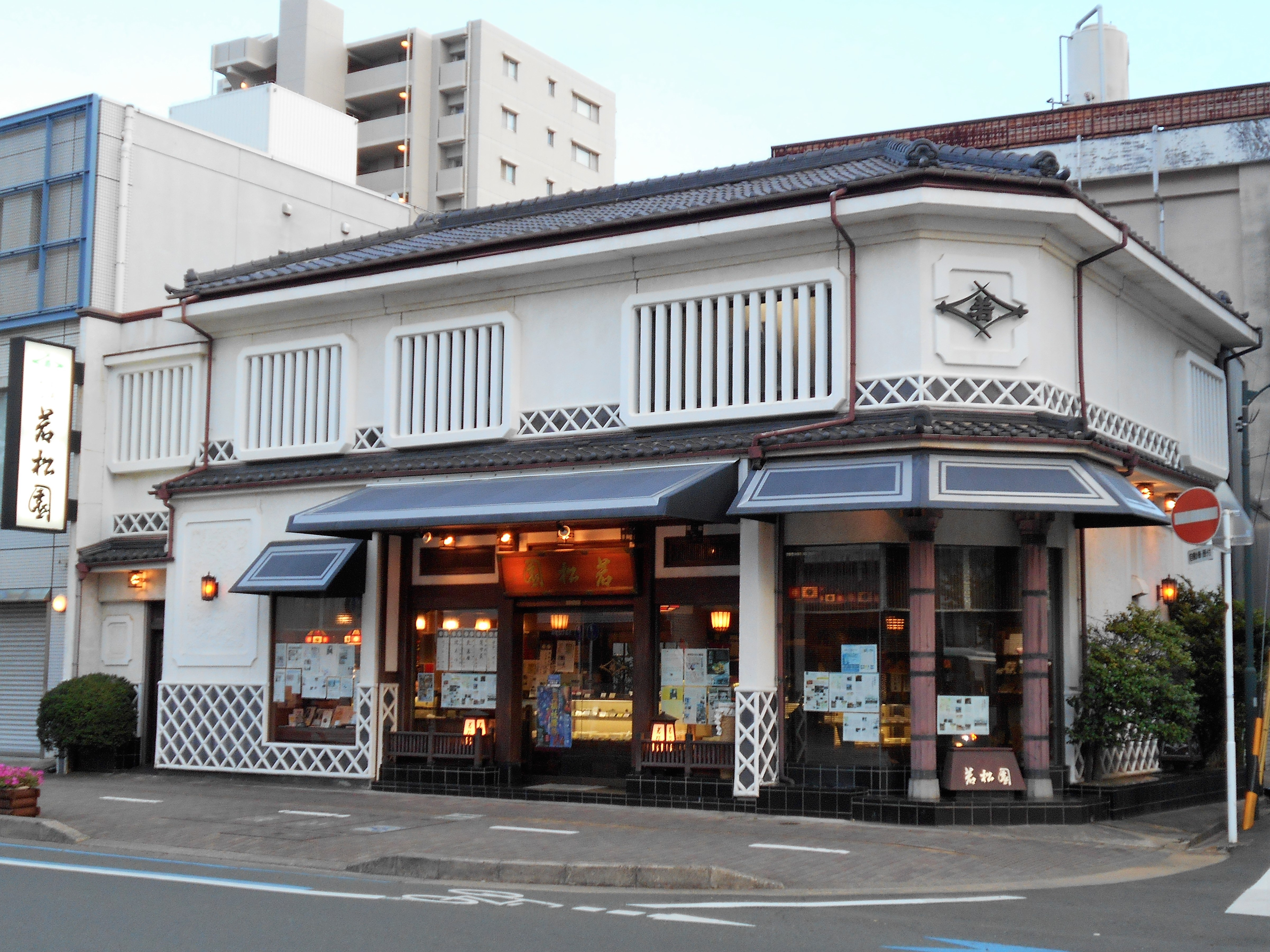 若松園本店（2017年7月）